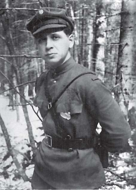 Ідеолог ОУН (б) Петро Федун у повстанському однострої під час перебування у підпіллі.